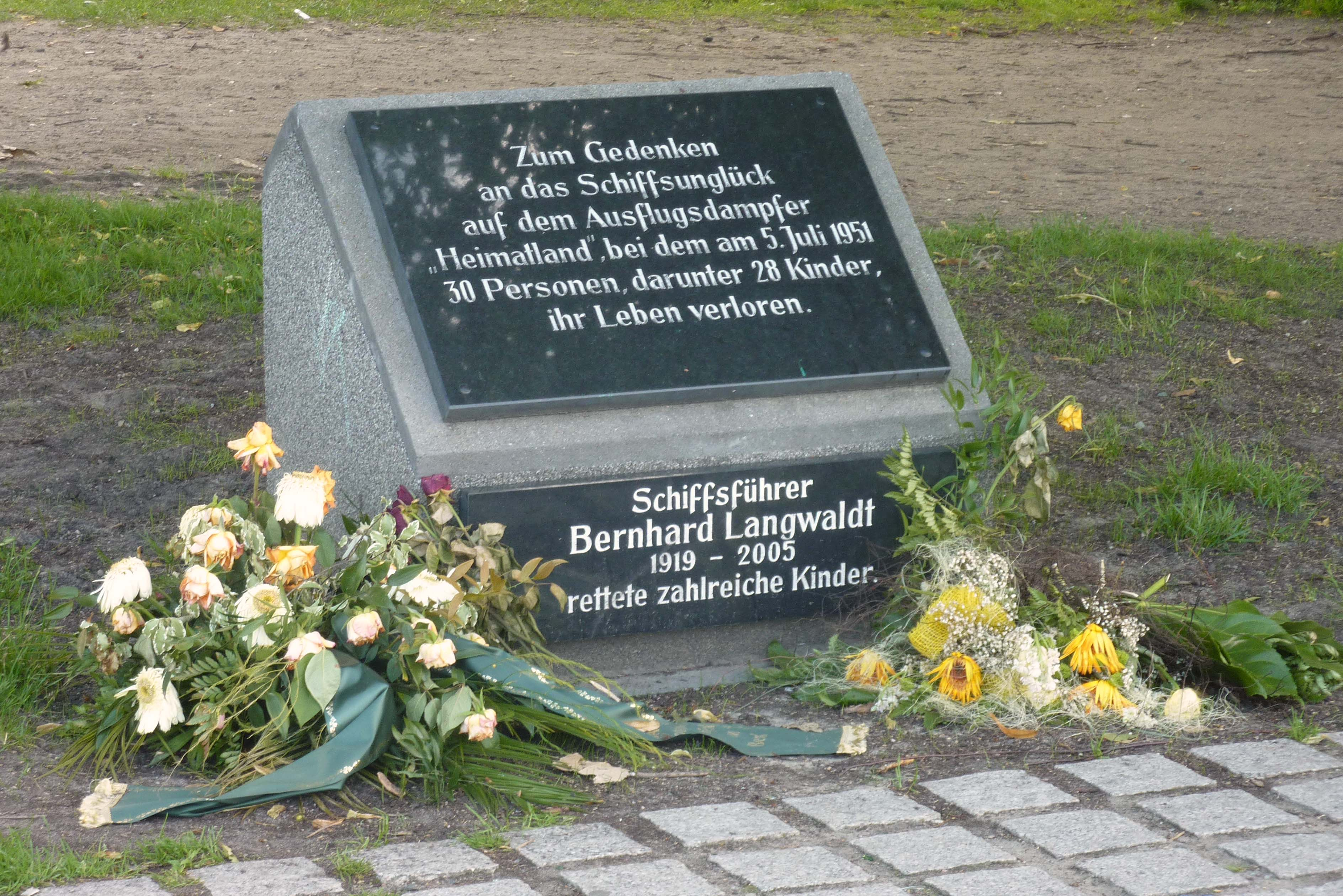 Gedenkstein am Treptower Hafen in Berlin-Alt-Treptow zur Brandkatastrophe des Ausflugschiffs "Heimatland".